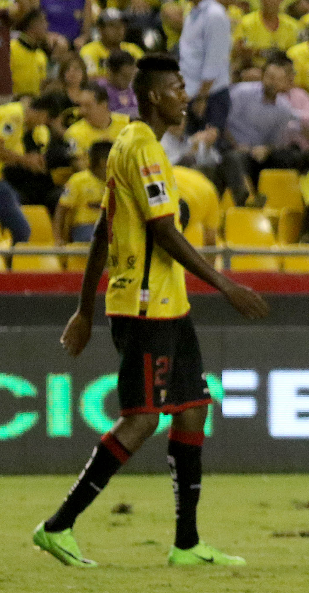 Guayaquil, miércoles 08 de noviembre del 2017 (Andes).- En el estadio Monumental Barcelona y Emelec se enfrentan en el tradicional Clasico del Astillero, este partido corresponde a la #10 fecha de la segunda etapa del campeonato nacional de fútbol. Foto:Andes/César Muñoz